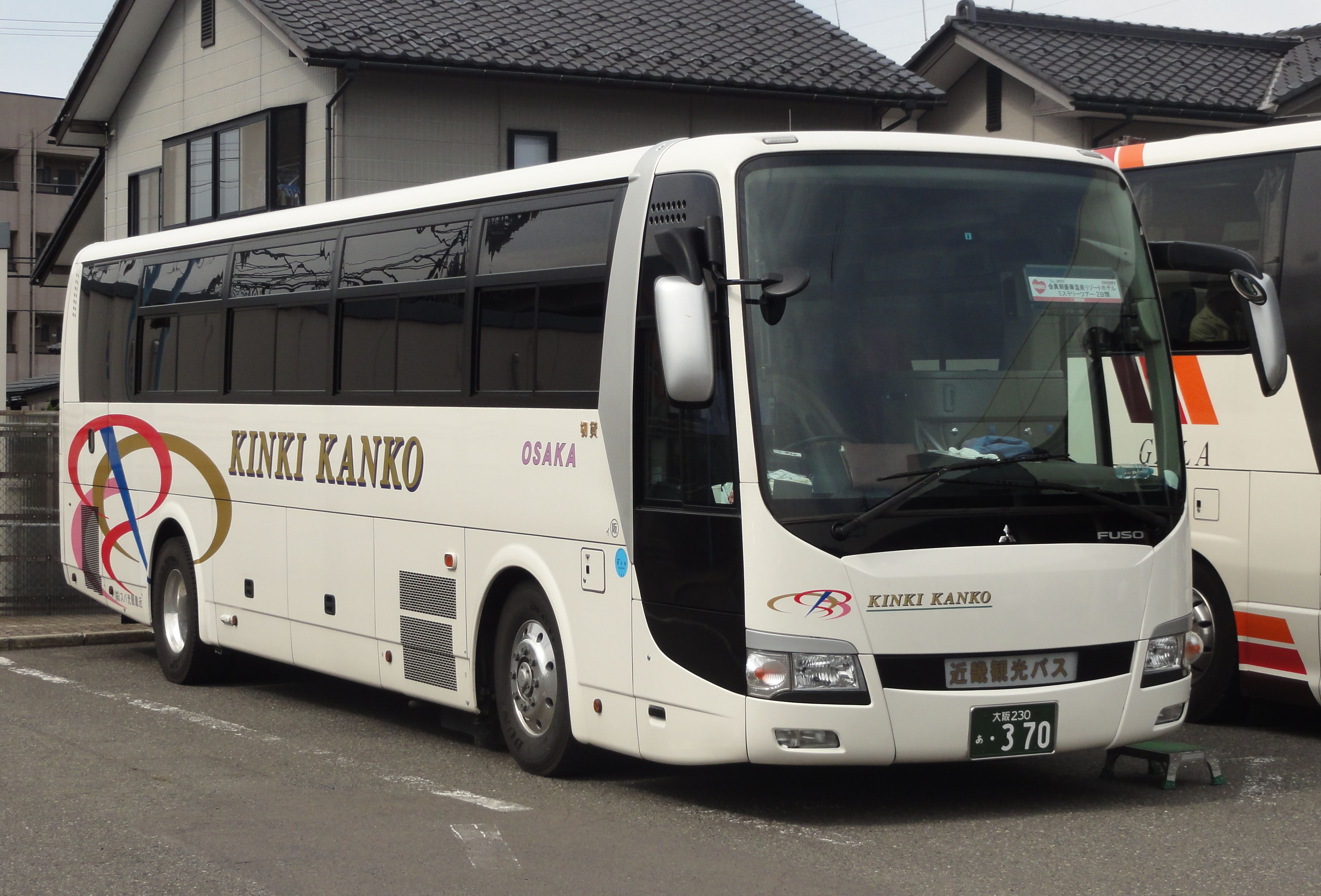 近畿観光バス 大阪230あ370